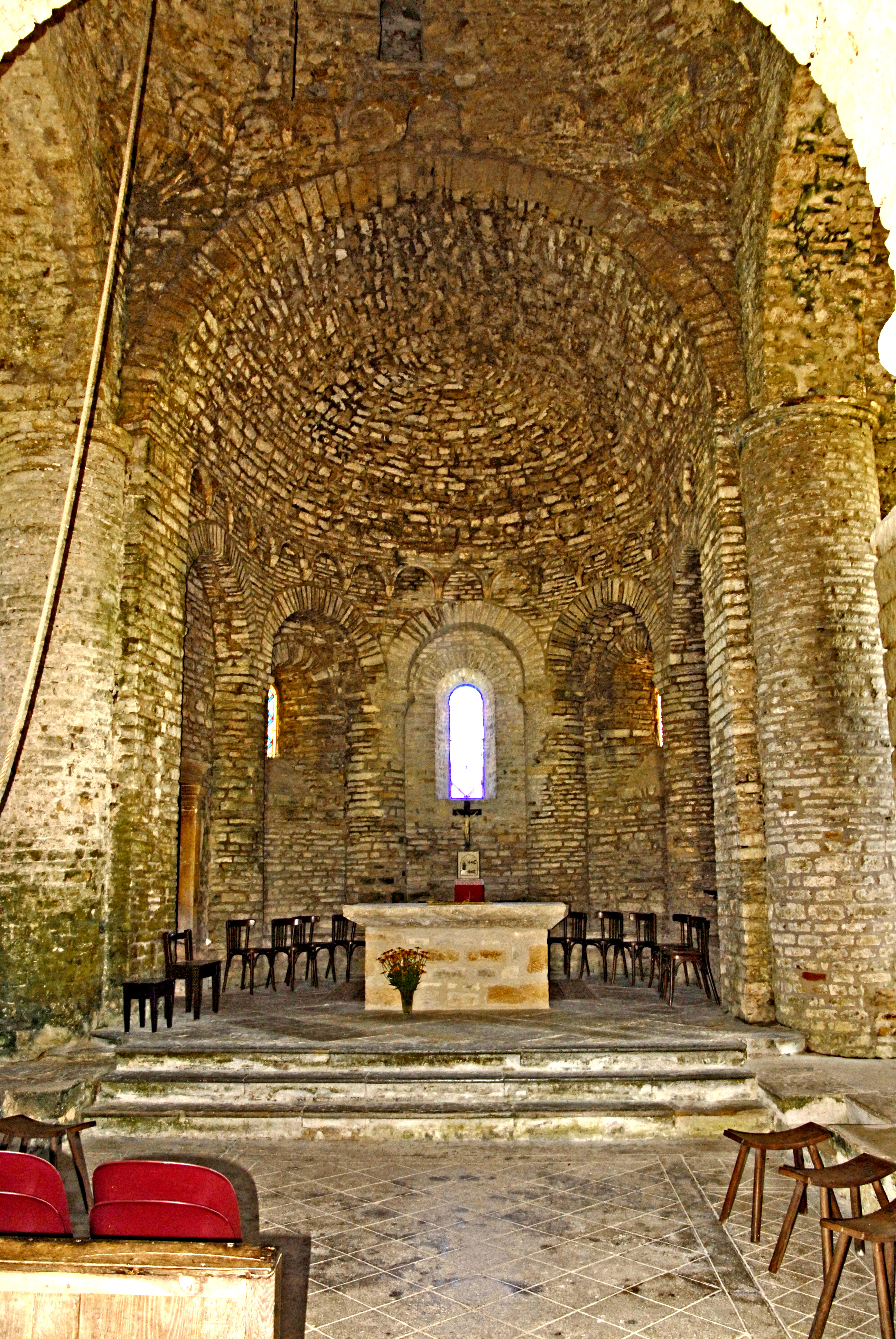 Saint-Hymetière, Chorapsis, große und kleine Blendarkaden